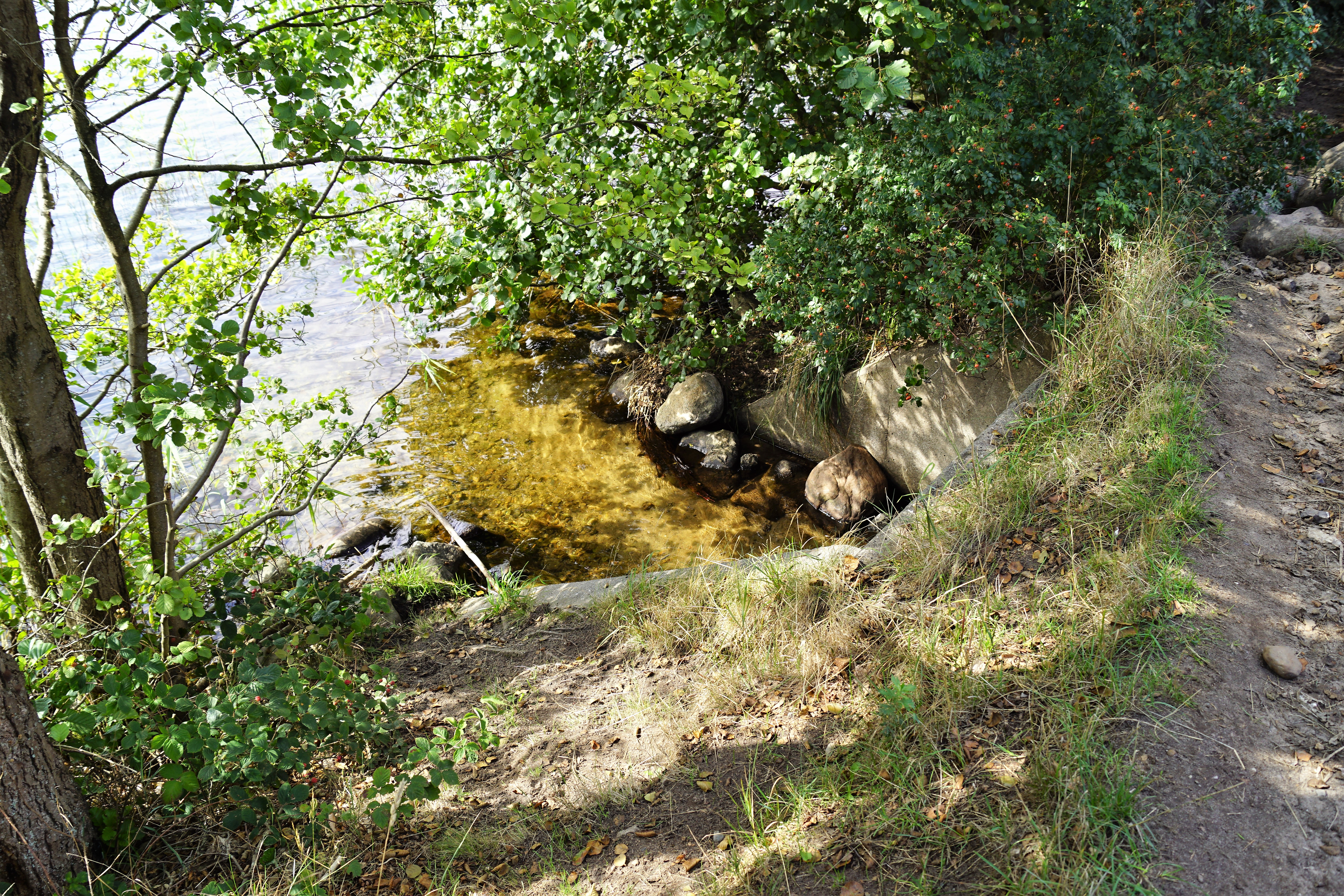 Almindsøs udløb til Fårbæk